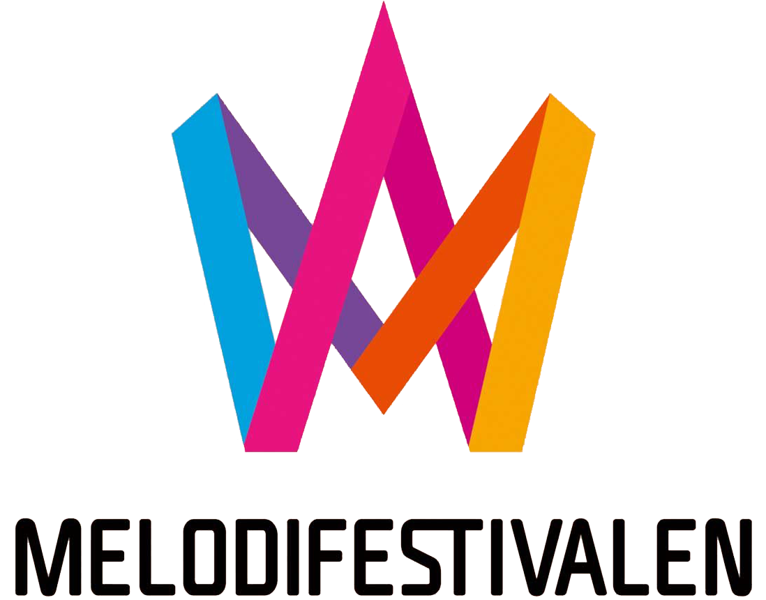 Das offizielle Melodifestivalen Logo.